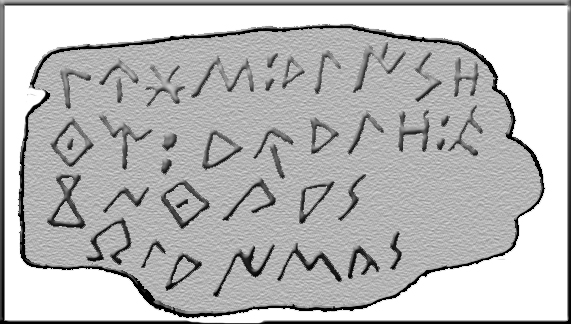 Reproduccion de una tésera celtibérica de procedencia desconocida